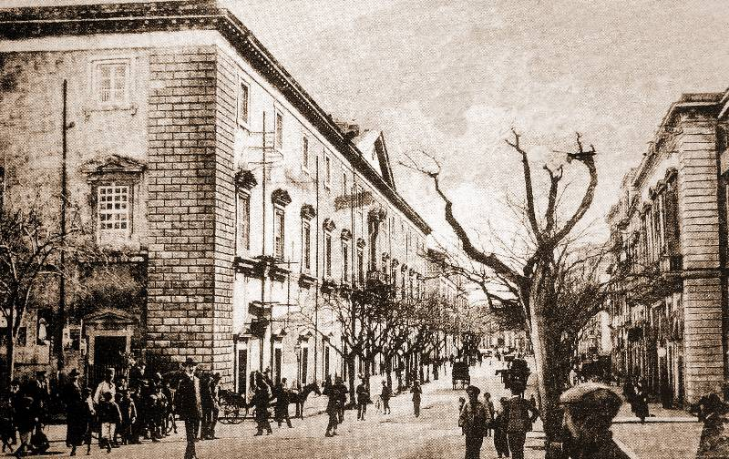 Foto, anteriore al Terremoto di Messina del 1908, dell'Ospedale Maggiore di Messina, opera di Andrea Calamech.